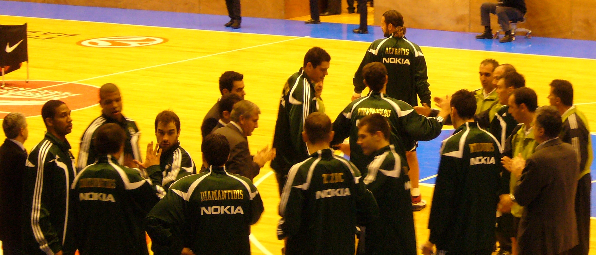 L'équipe du Panathinaikos BC en novembre 2007 pour l'Euroleague (Clermont-Ferrand)